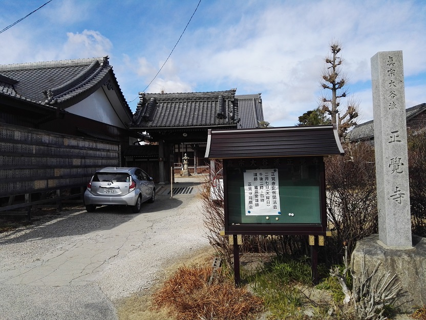 Shoukaku-ji temple